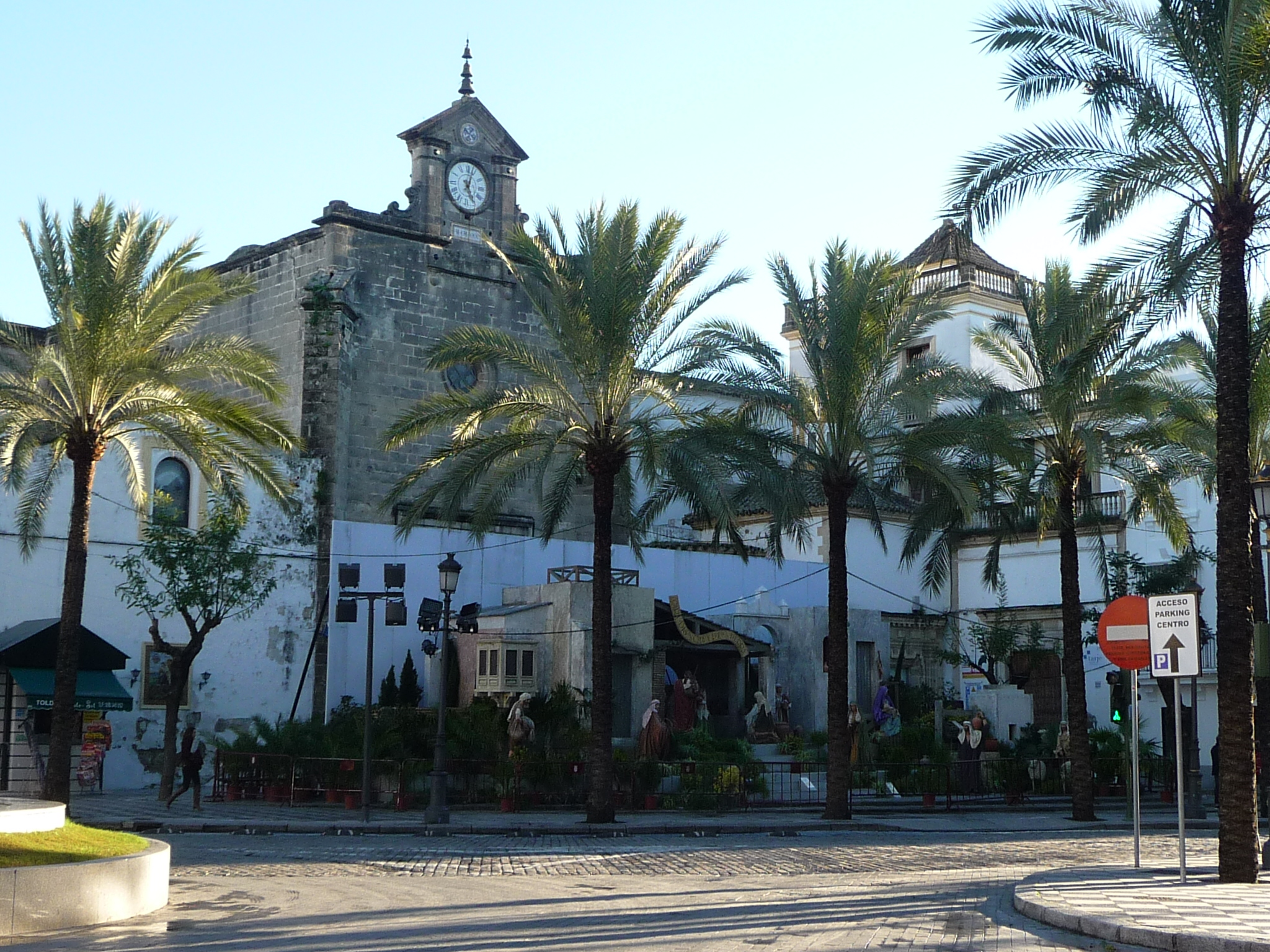 Iglesia de Santo Domingo (Jerez de la Frontera) en Navidad